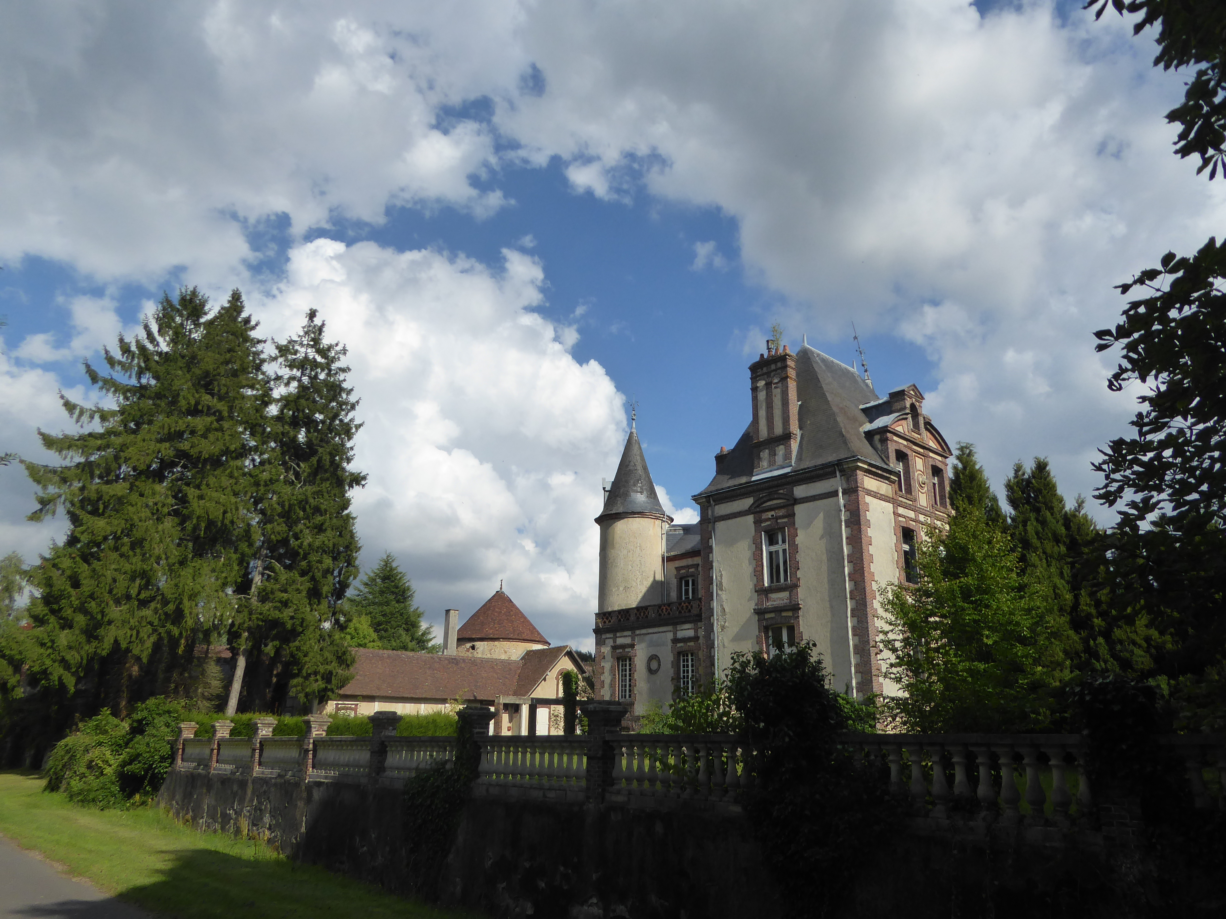 Château de Tardais, sur la commune de Senonches, en Eure-et-Loir.